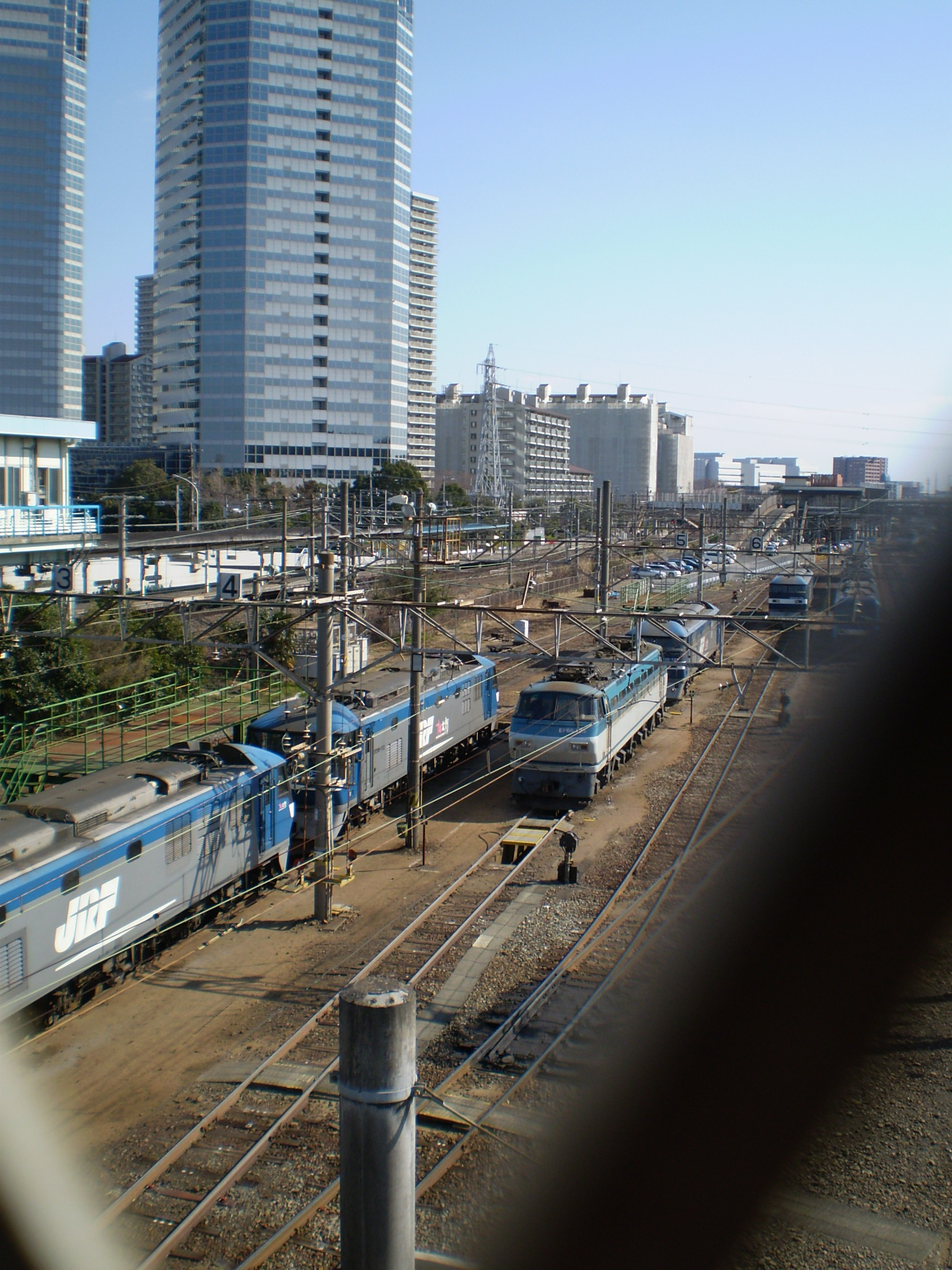 Shin Kawasaki Station Rails